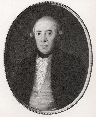 Frans Suell (1744-1817)